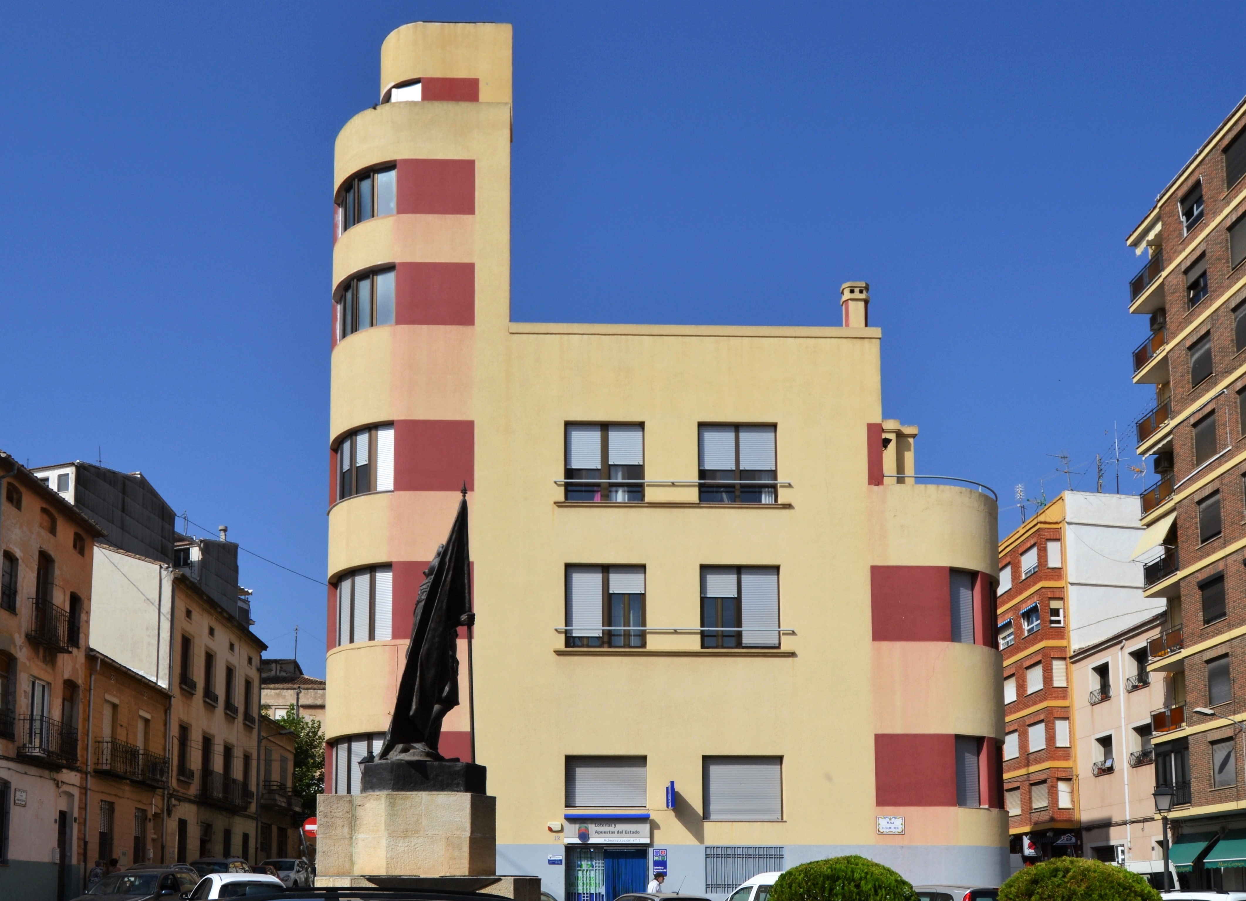 Edifici Merín, Cocentaina, el Comtat.